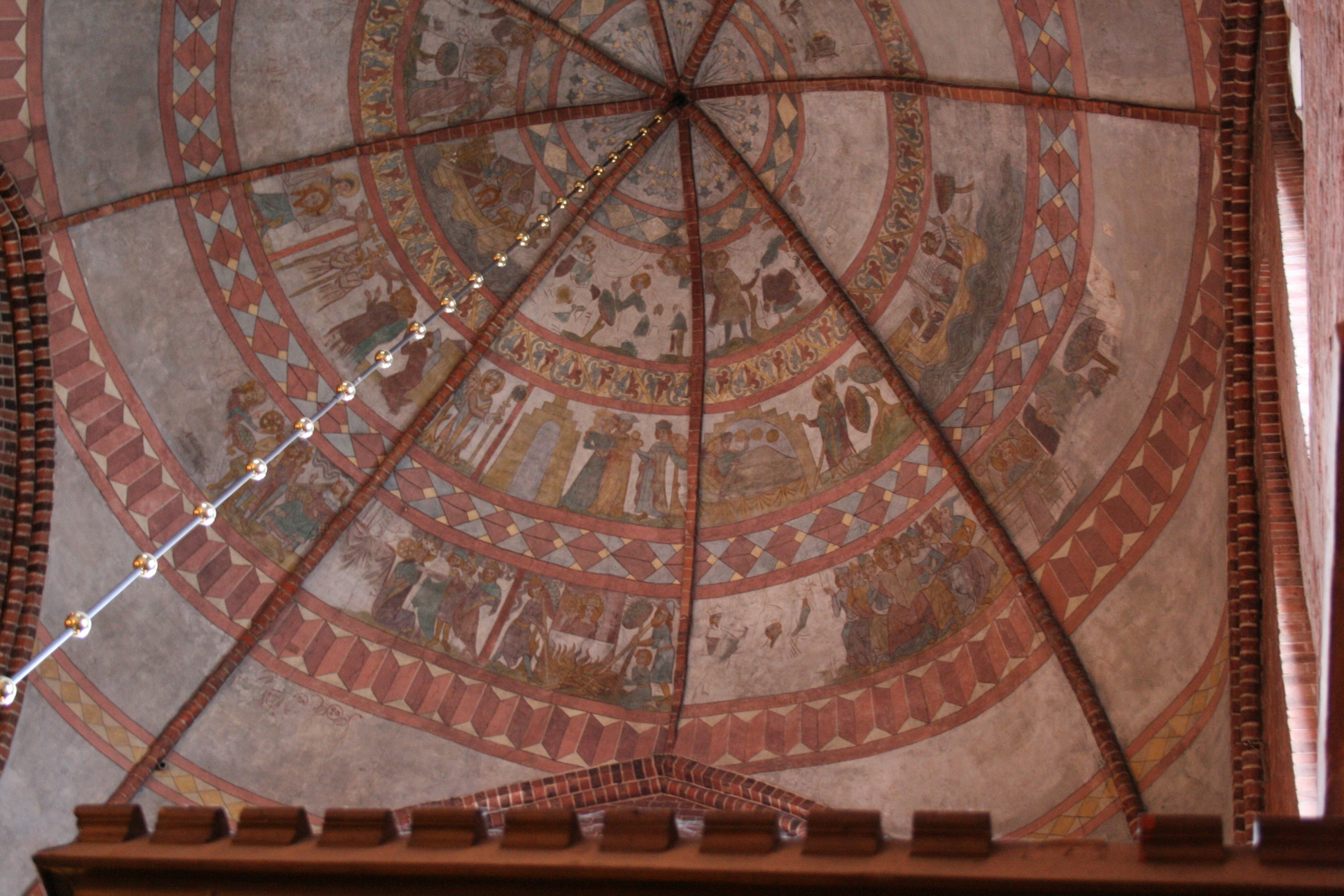 Deckengemälde der mittleren Kuppel des Meldorfer Doms